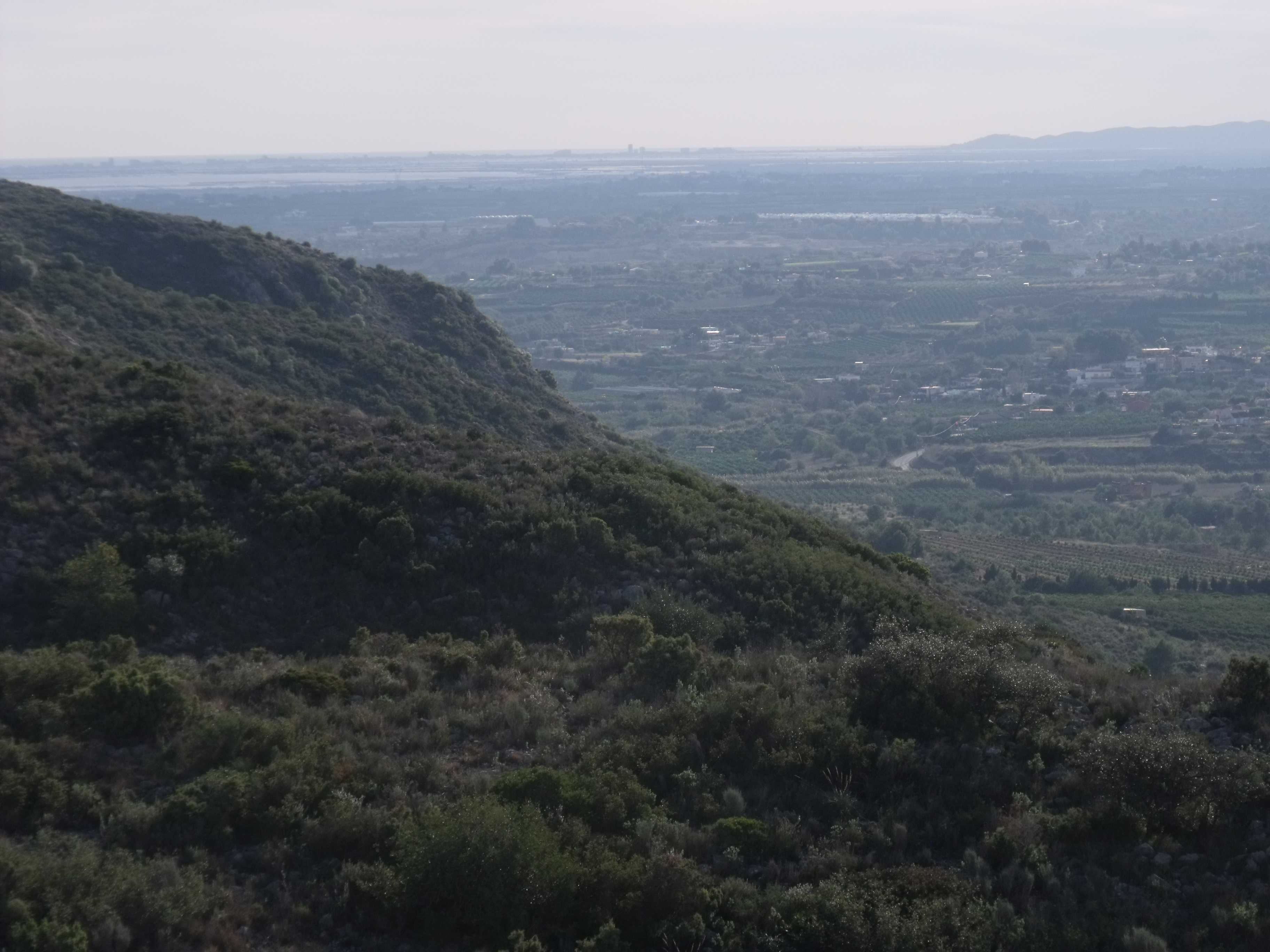 Vista hacia el sudeste desde la Sierra Perenchiza. Se alcanza a ver el Mediterráneo y la Albufera.